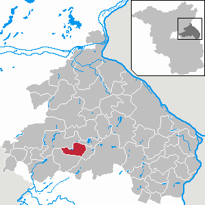 Garzau-Garzin in Brandenburg (Country) - District Märkisch-Oderland